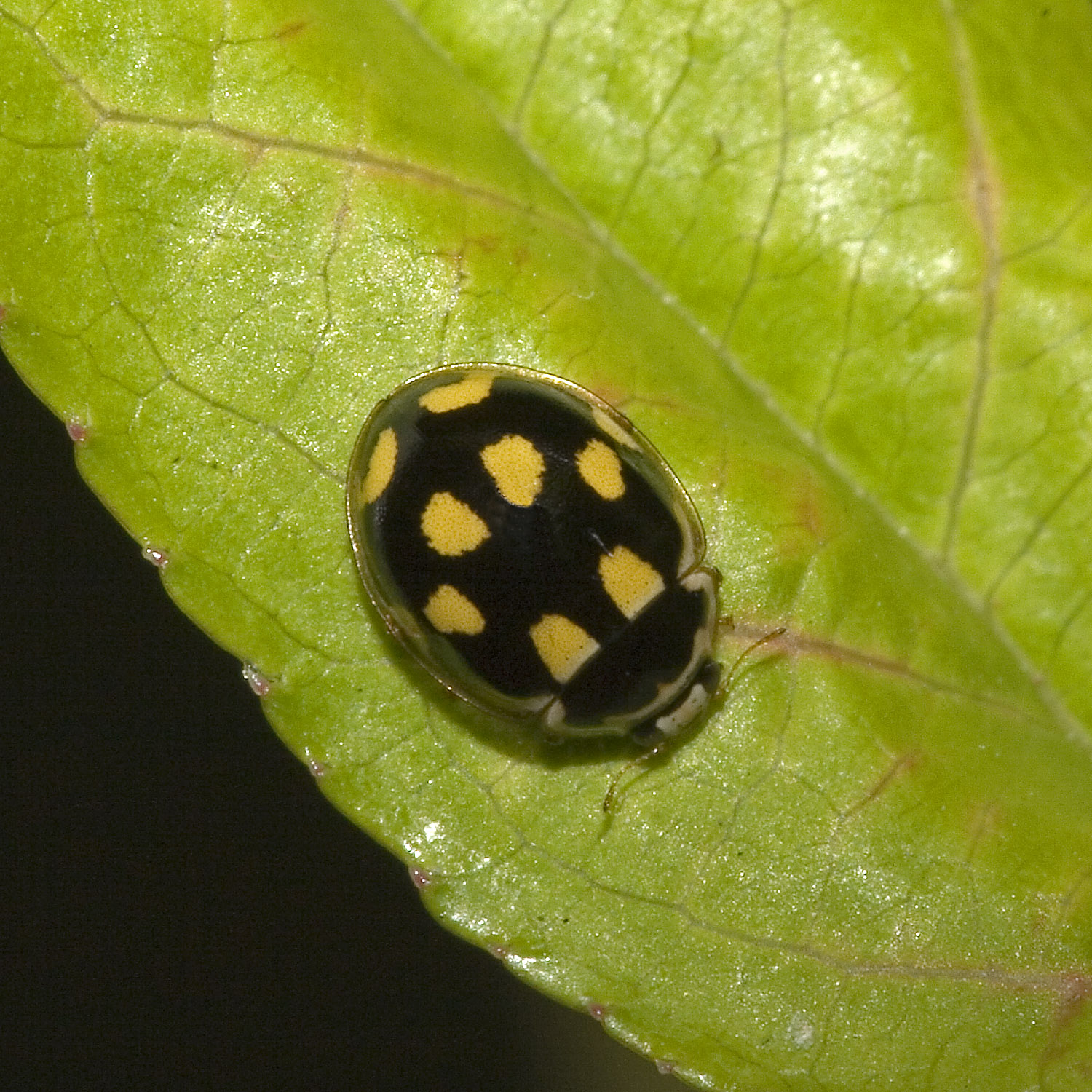 Propylea quatuordecimpunctata (Linnaeus, 1758